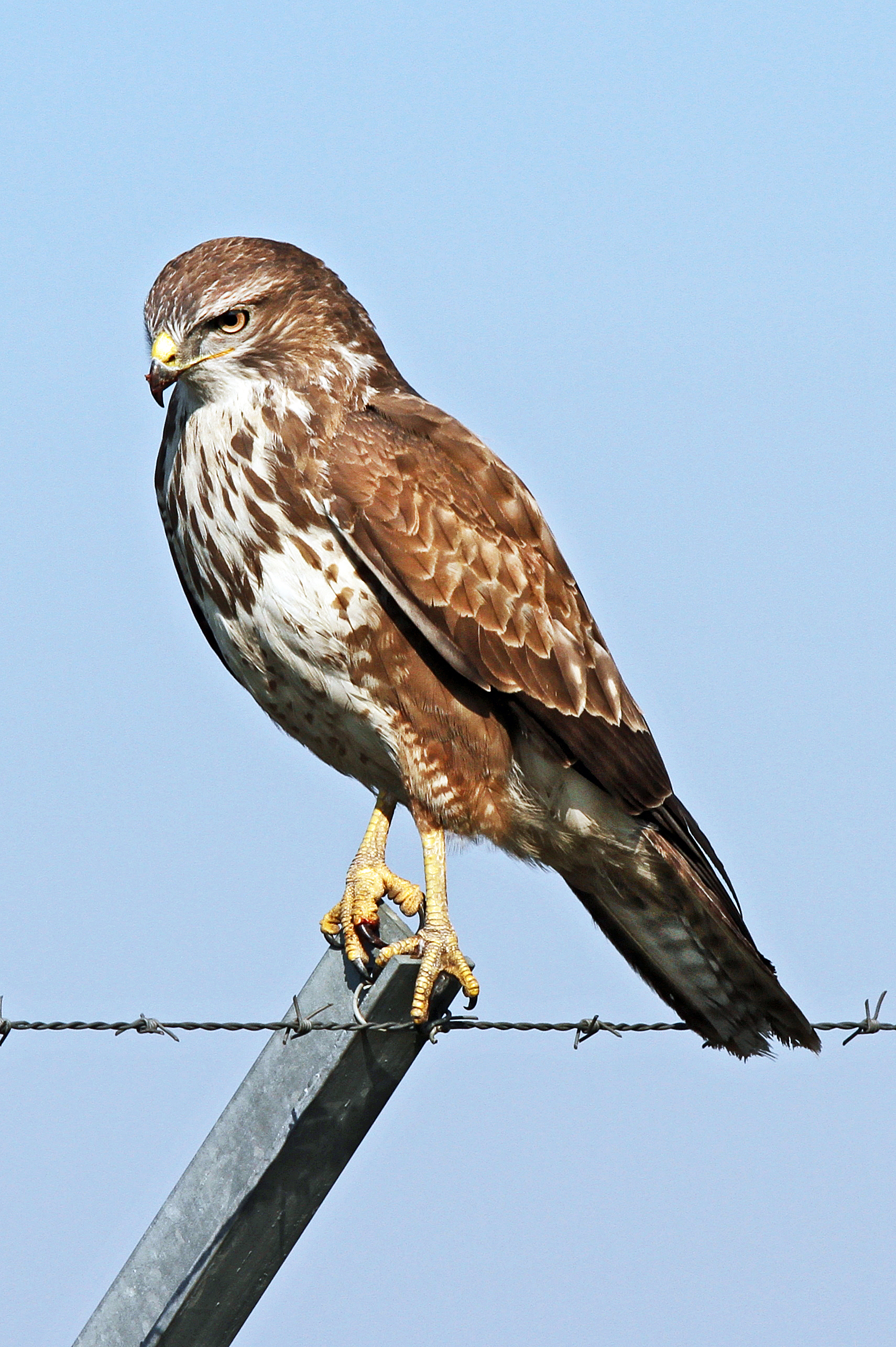 Buteo buteo, Hannover Airport perimeter fence, Hannover, Germany